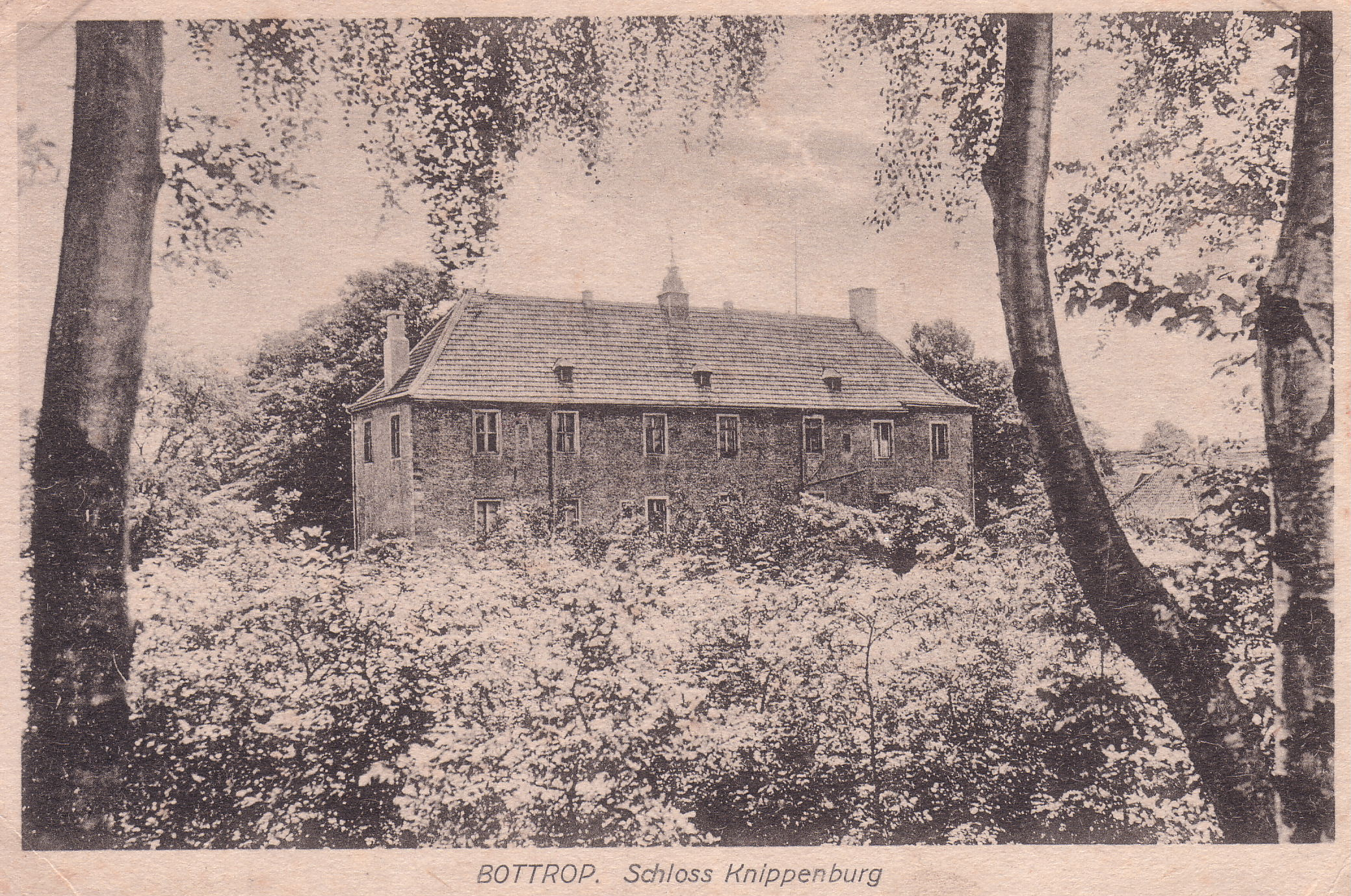 Haus Knippenburg, Germany